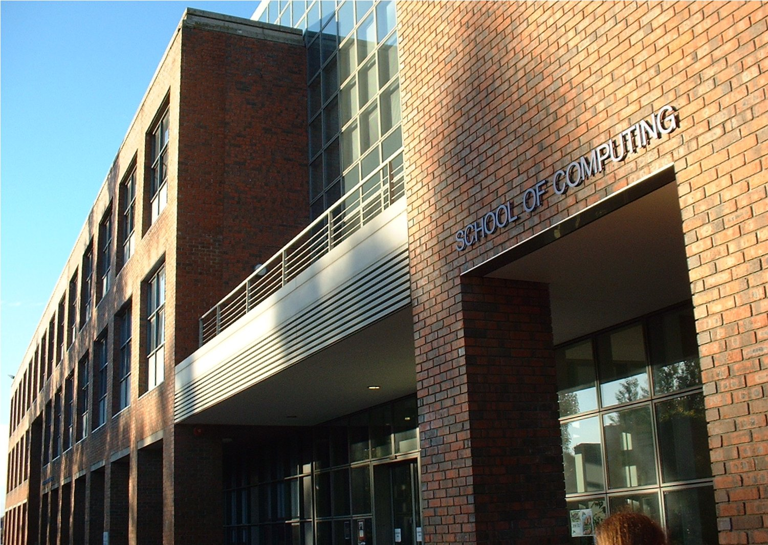 Le bâtiment de l'école d'informatique (School of Computing) sur le campus de Dublin City University. Photo personnelle prise le 8 octobre 2005.